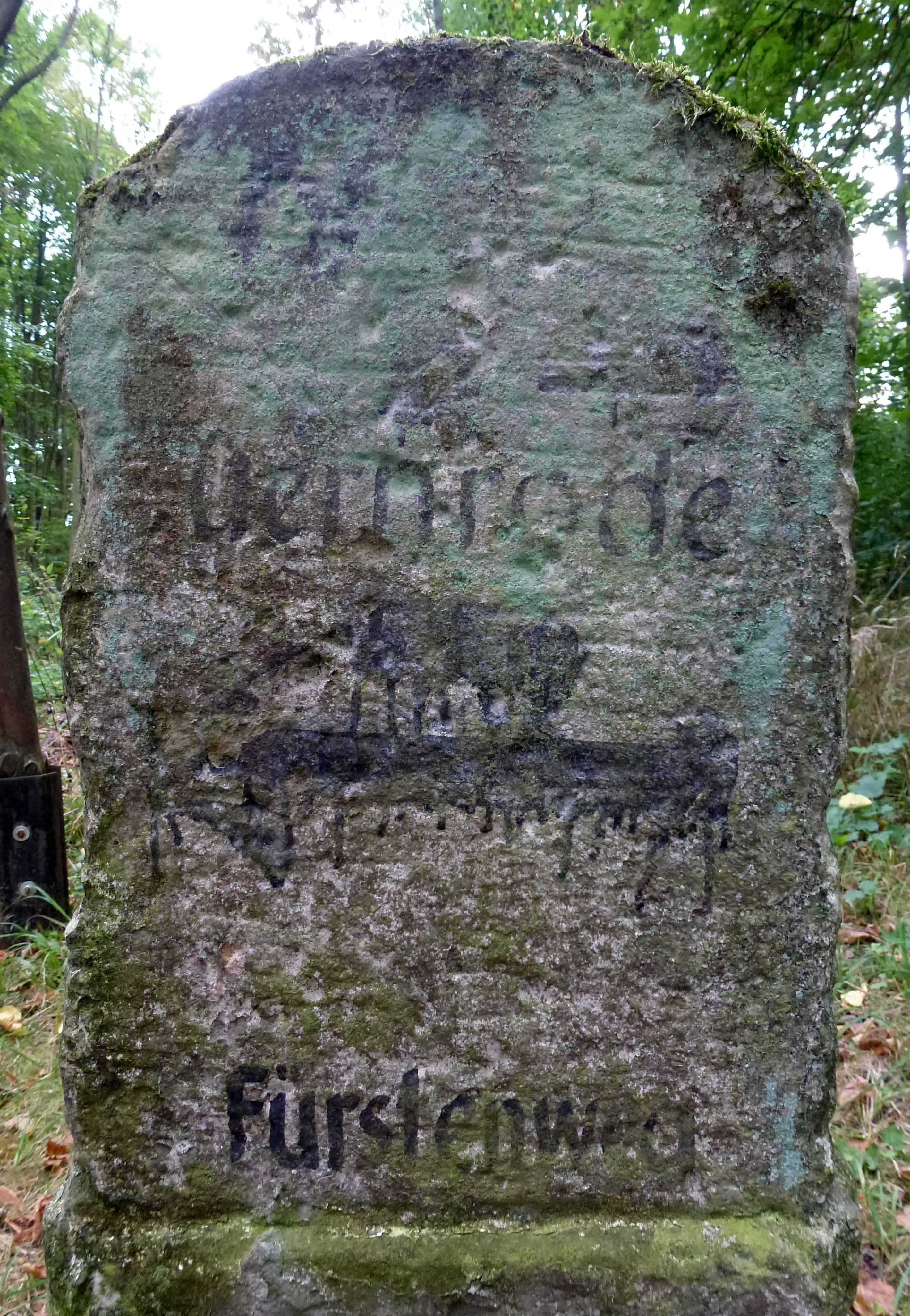 Denkmalgeschützter steinerner Wegweiser am Westausgang des Schlossparks Ballenstedt.